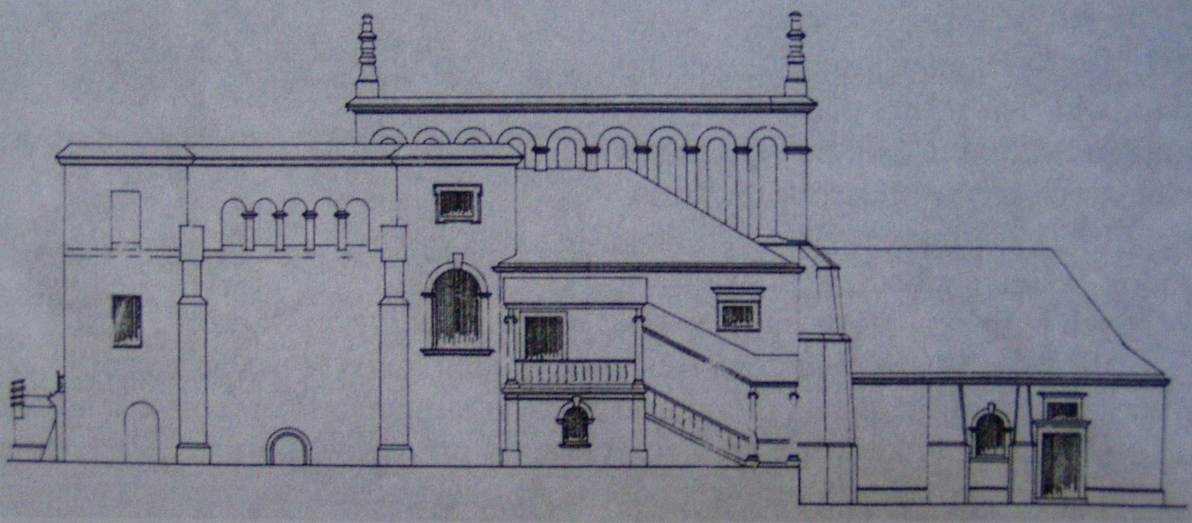 Projekt przebudowy więźby dachowej oraz restauracji attyki Starej Synagogi w Krakowie (1913)